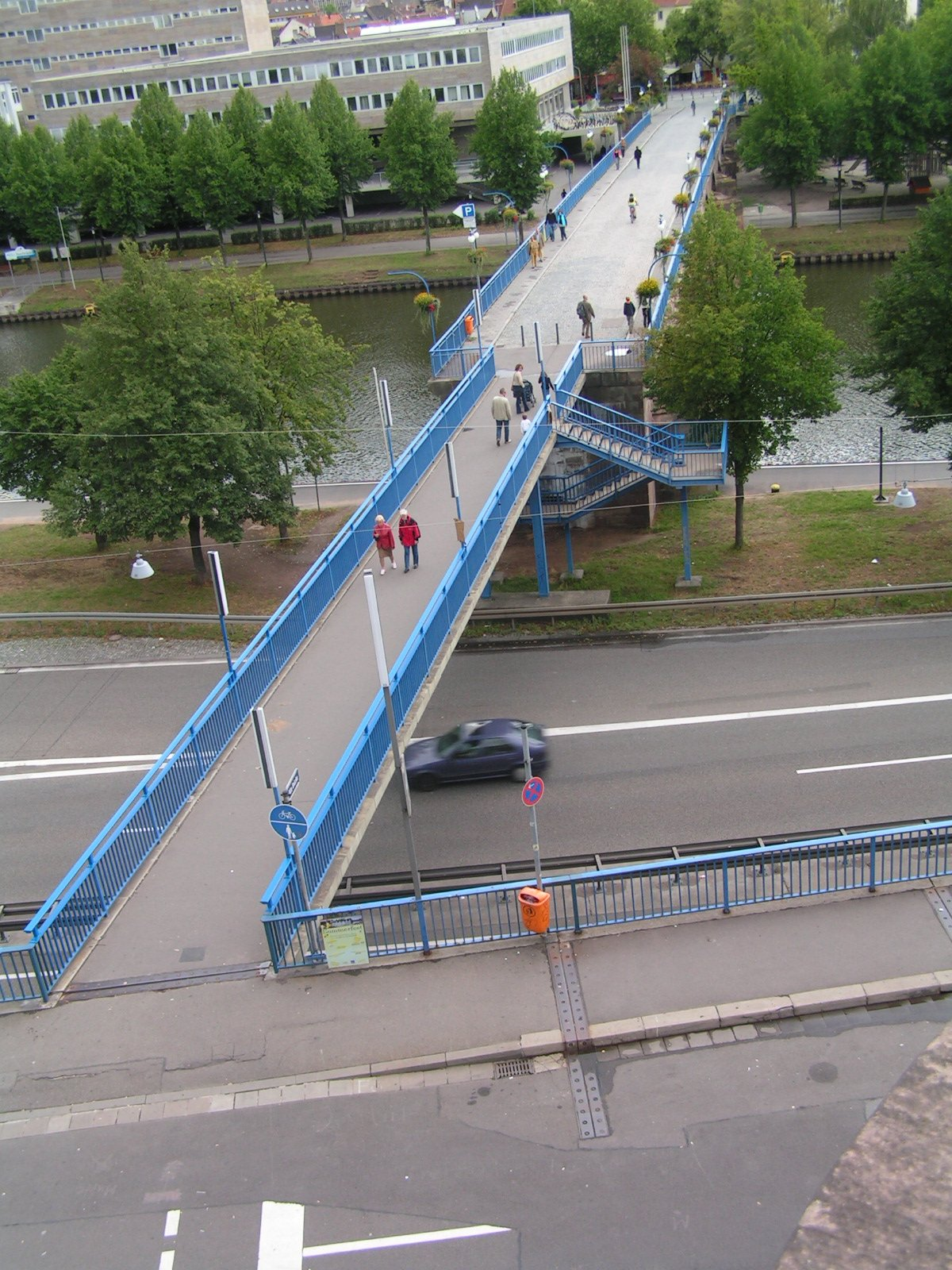 Saarbrücken - Alte Brücke